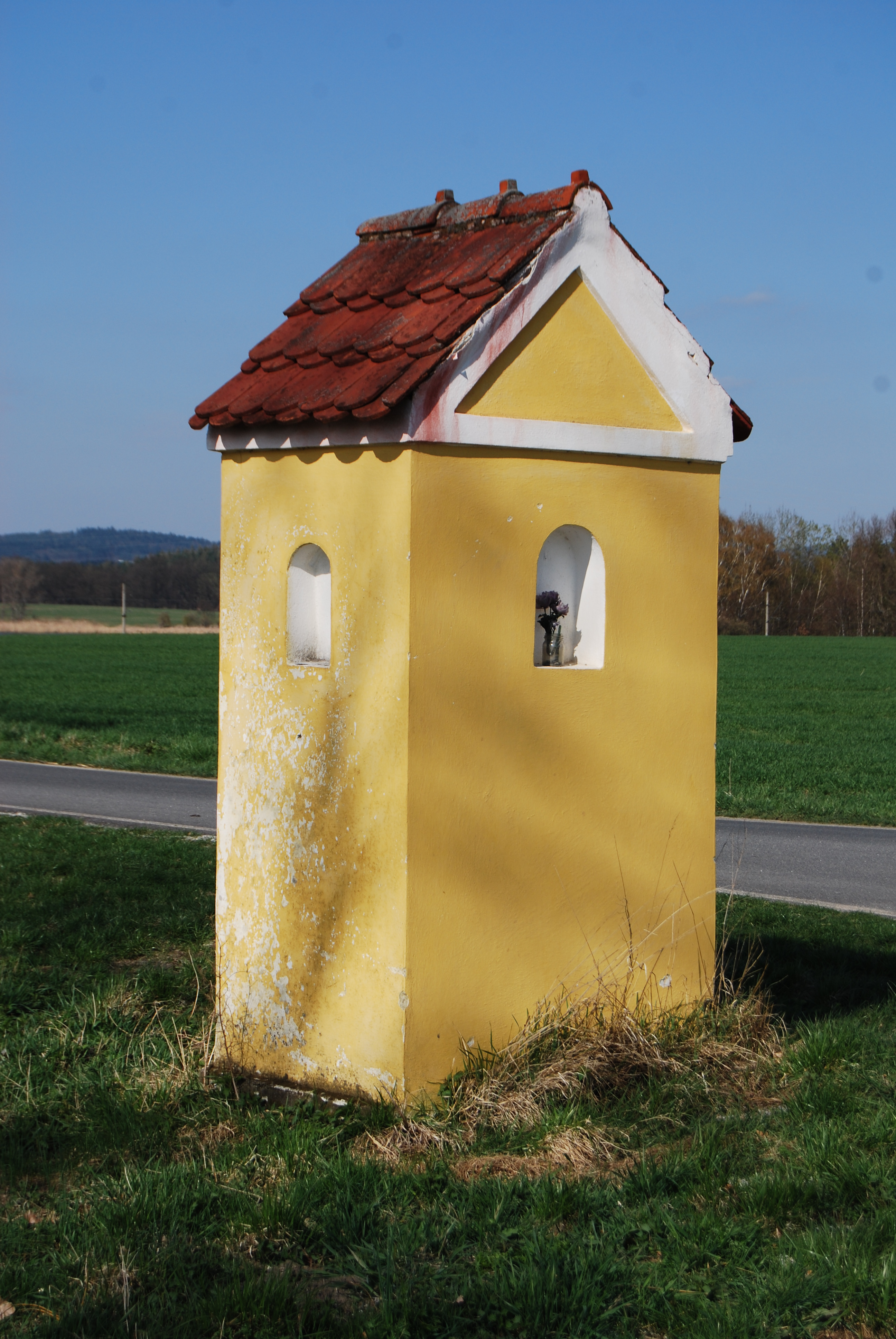 Výklenková kaple zasvěcená svatému Floriánovi z 2. pol. 18. století. Ražice (Okres Písek. Česká republika.